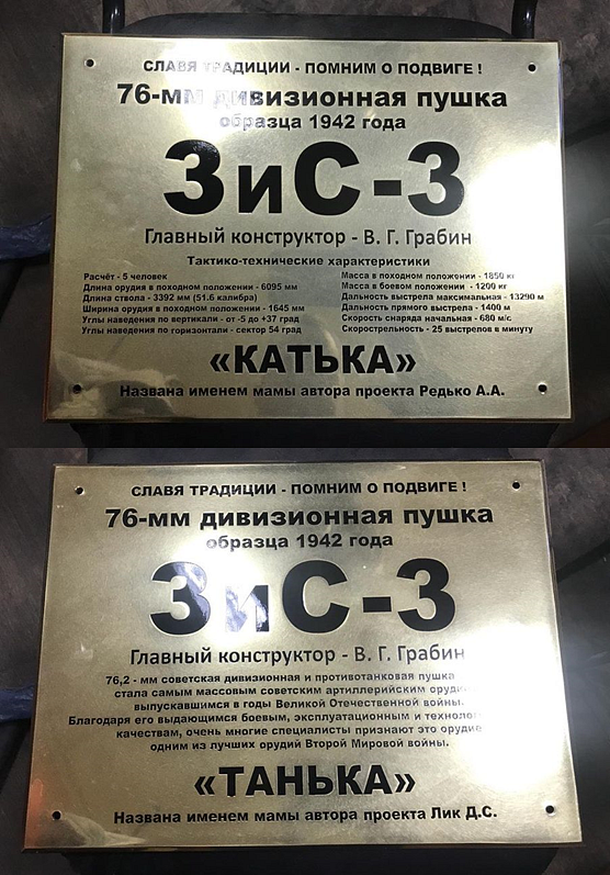 Таблички на орудия ЗиС-3